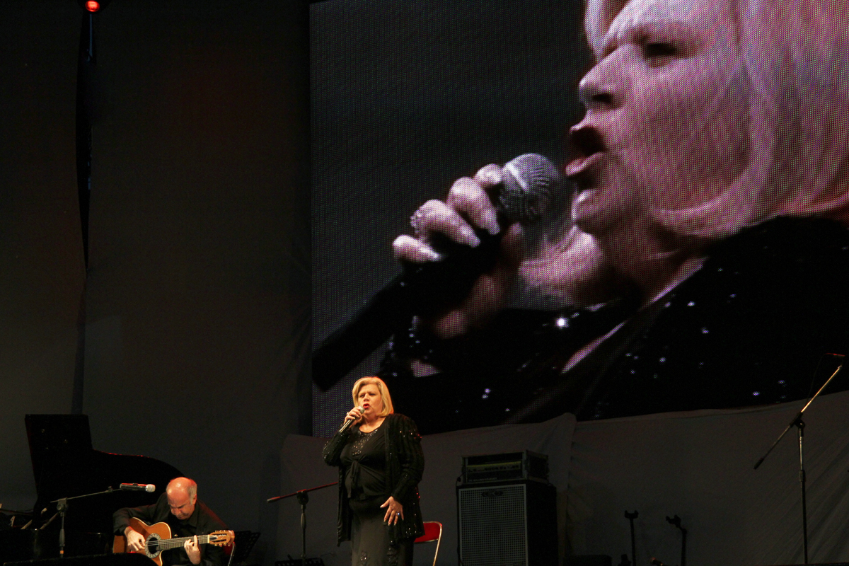 El guitarrita Esteban Morgado se presentó junto a María Graña. ( Foto: Estrella Herrera)